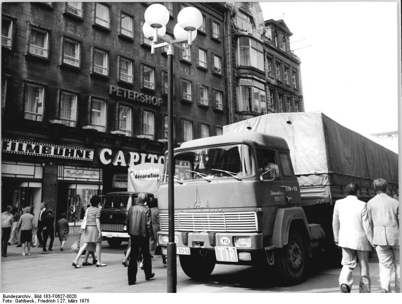 Leipzig, Petersstraße, Lastkraftwagen ADN-ZB Gahlbeck 27.3.73 Leipzig: Die Messemetropole erwartet ihre Gäste.-Auf den Straßen der Leipziger Innenstadt herrscht gegenwärtig besonders starker Verkehr. Fahrzeuge aus den verschiedensten Ländern treffen mit Messegütern ein. Wie hier ein LKW aus Jugoslawien. Am 31.5.1975 wird die Herbstmesse 1975 offiziell eröffnet. siehe auch P0627-20N